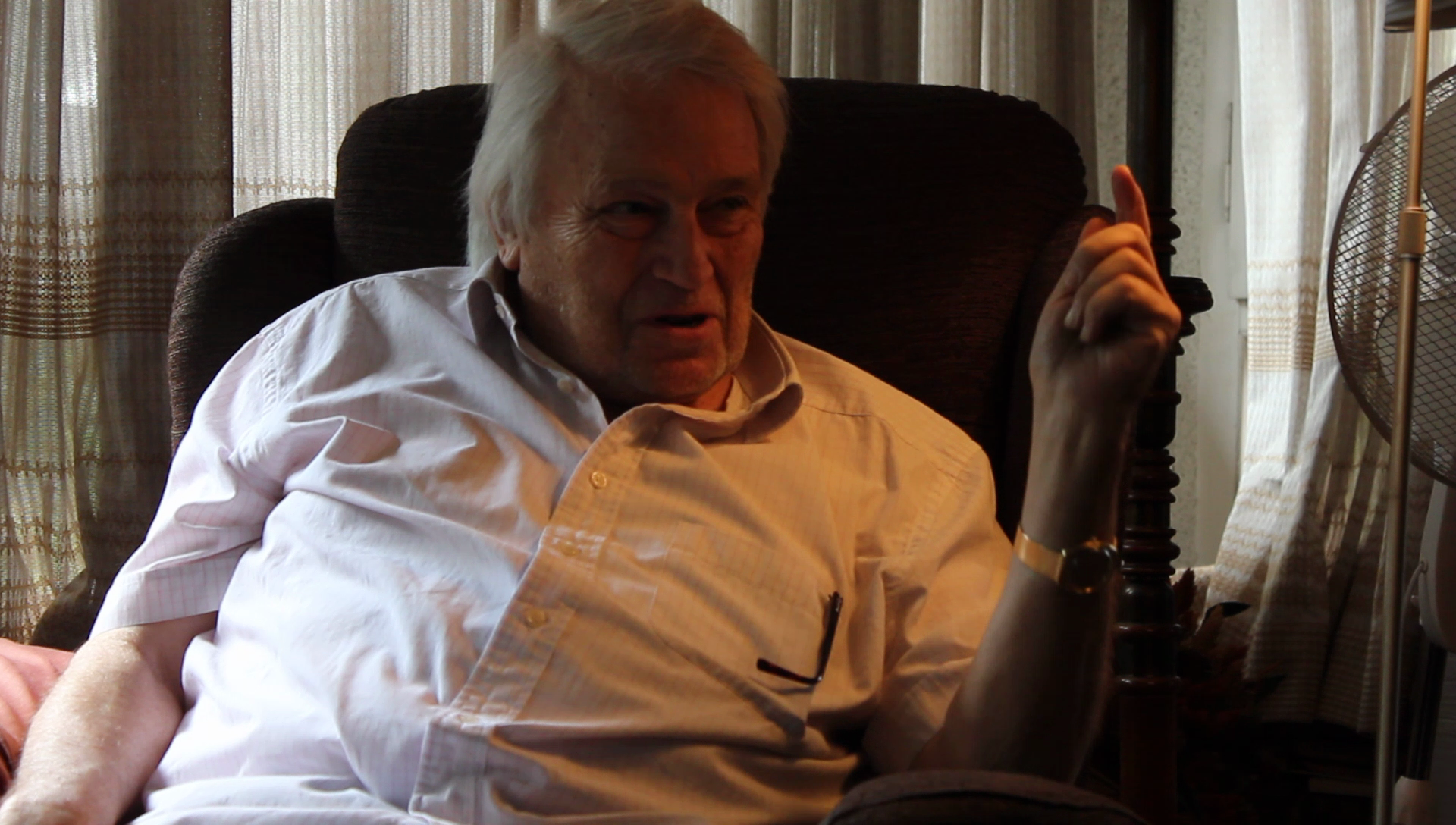 Francesc Garriga i Barata